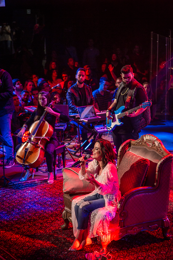 Ana Paula Valadão DT19 outra vez